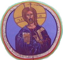 Фреска во црквата „Св. Илија“ во струшка Јабланица